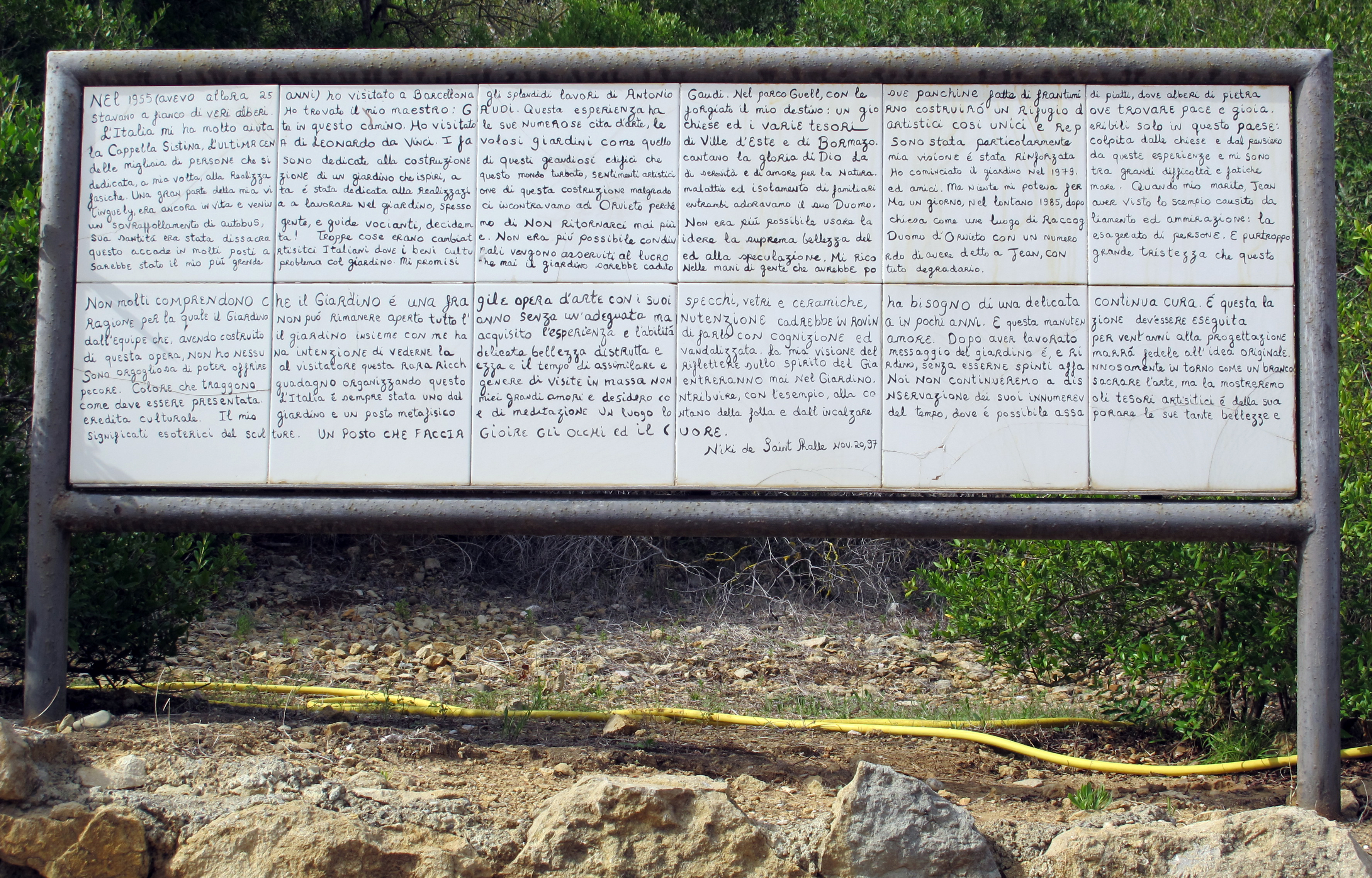 Giardino dei Tarocchi, Capalbio